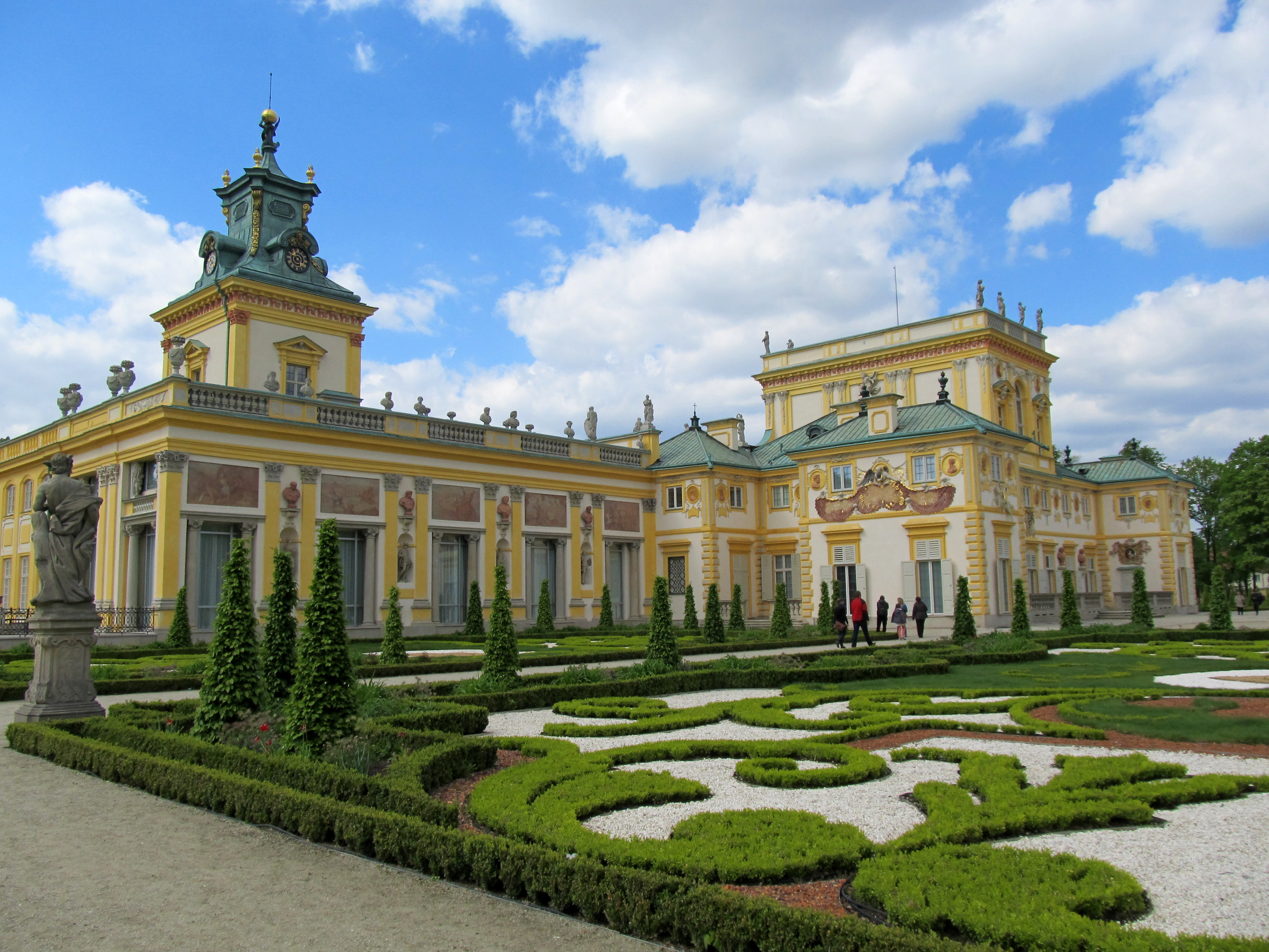 Warszawa, pałac Królewski z Łazienką Lubomirskiej (Marconiówka)